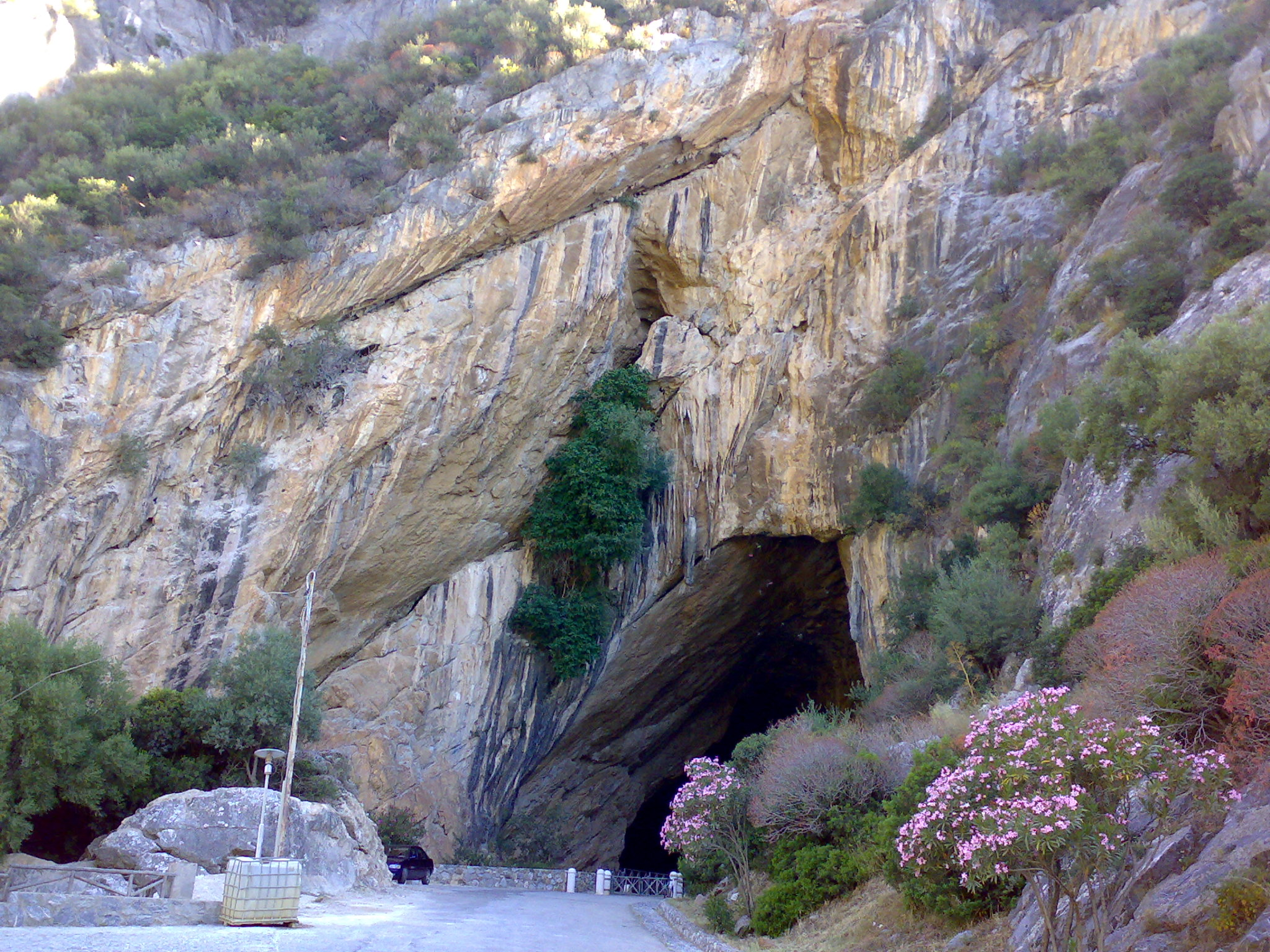 Ingresso Sud Grotte San Giovanni